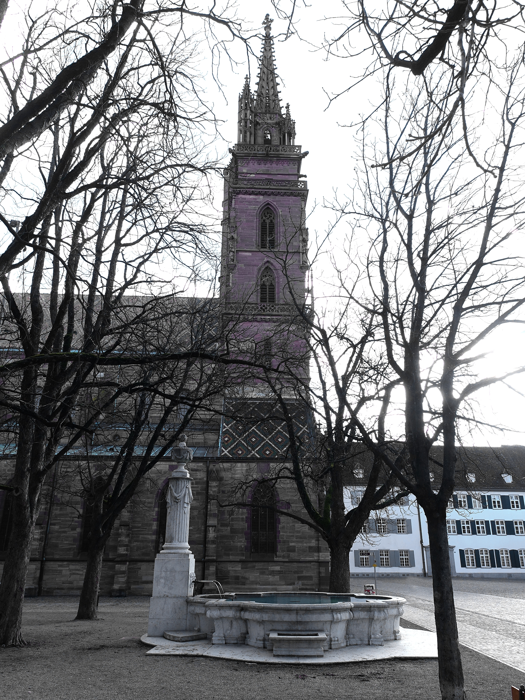 Pisoni-Brunnen auf dem Münsterlplatz von Basel. Paolo Antonio Pisoni (1738–1804)